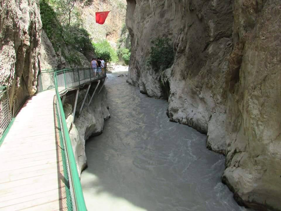 Saklıkent Kanyonu'ndan bir görünüm.